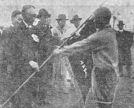 1922년 전국체육대회 축구(제3회 전조선축구대회)에서 우승기를 수여하는 모습.